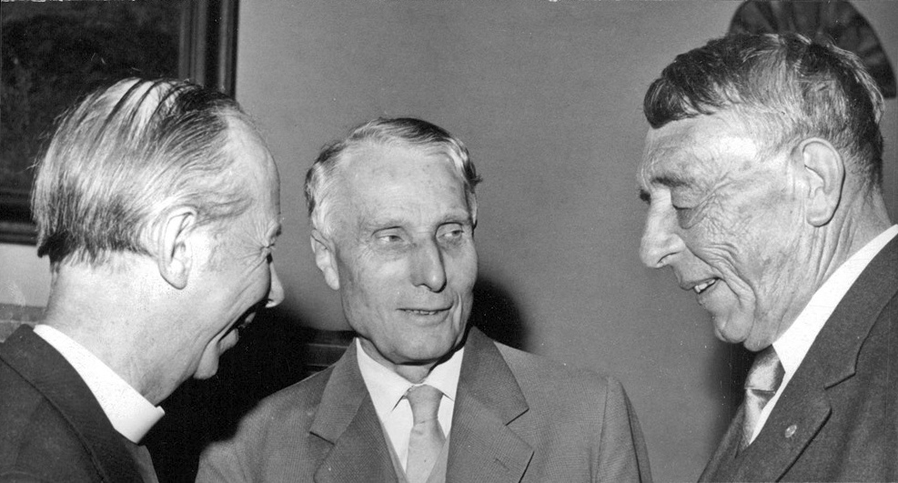 Direktor Olov Hartman och biskoparna Manfred Björkquist och Arne Fjellbu.Sigtunastiftelsens sommarkurs som traditionellt hålles vartannat år öppnades kl. 11 på tisdagen av direktor Olov Hartman som talade över ämnet "Kristus i själavården". Kursen som i år samlat ett 80-tal deltagare från de nordiska länderna pågår till den 6 augusti. Bland gästerna märks biskop Manfred Björkquist och biskop Arne Fjellbu från Trondheim. Ett flertal ämnen behandlades under kursen, bland annat "Kapmen för folkkyrkan" och "Nya testamentets Kristusbild".